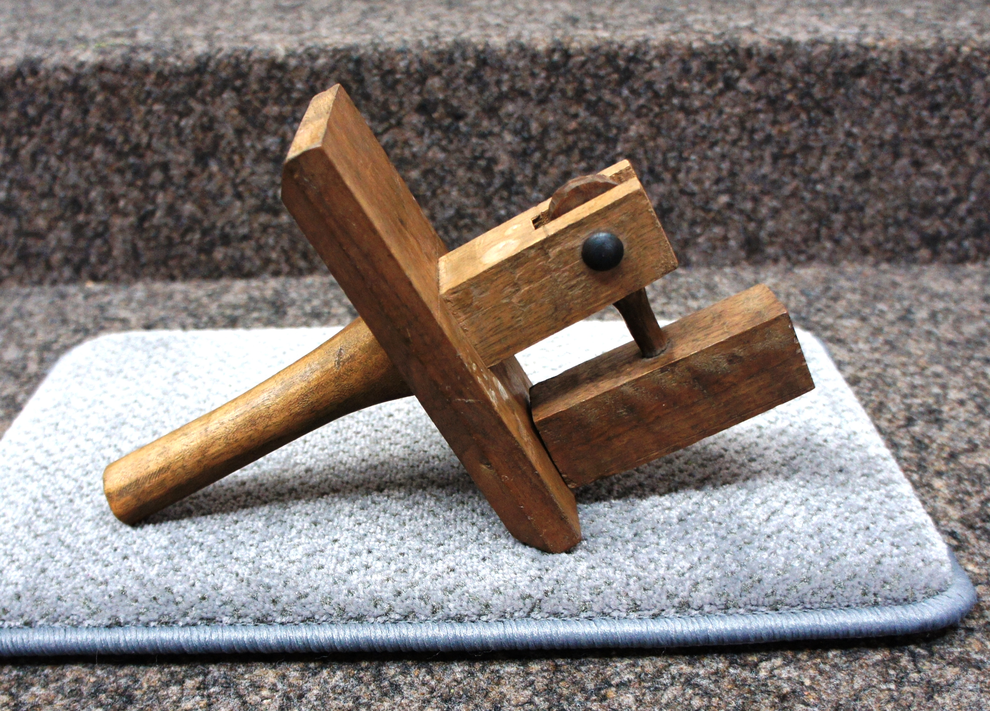 Eine Klapper auf einem Kissen, das auf den Stufen zum Altar in der kath. Kirche in Rebstein liegt.